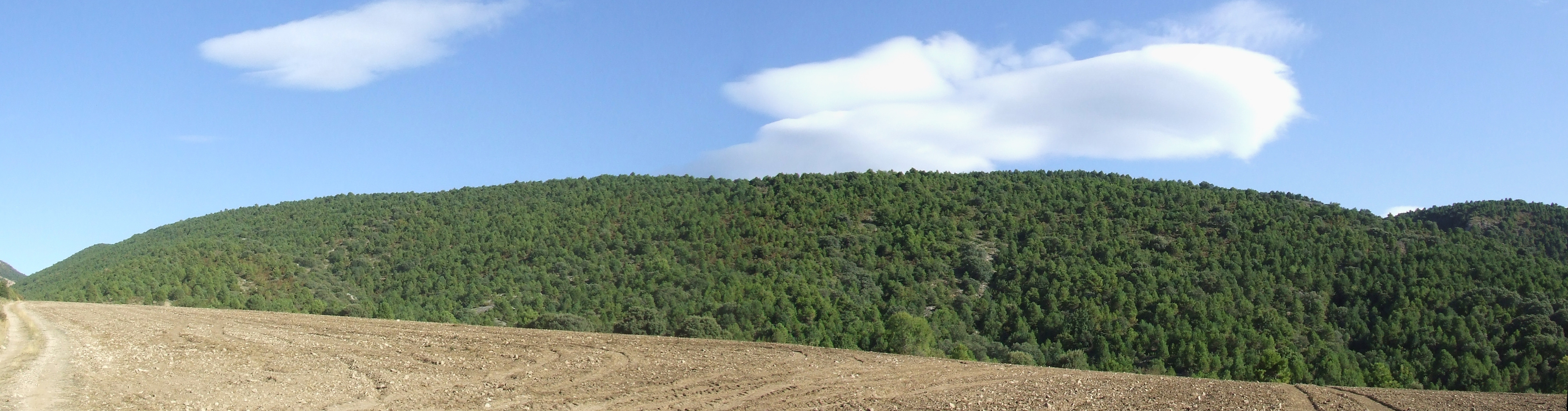 Panoràmica de l'Obaga de Fonguera (Abella de la Conca, Pallars Jussà)